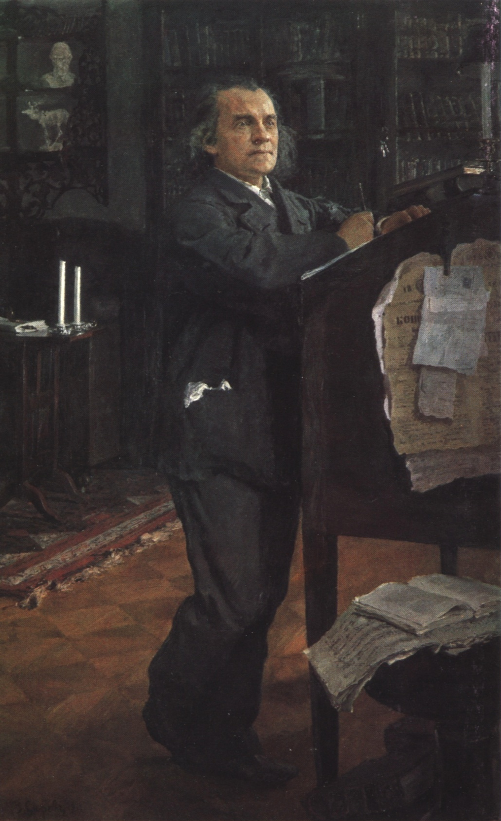 Compositor Alexander Serov por Valentin Serov, 1887-1888